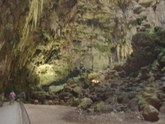 Photo de la grotte de castellane Grotte